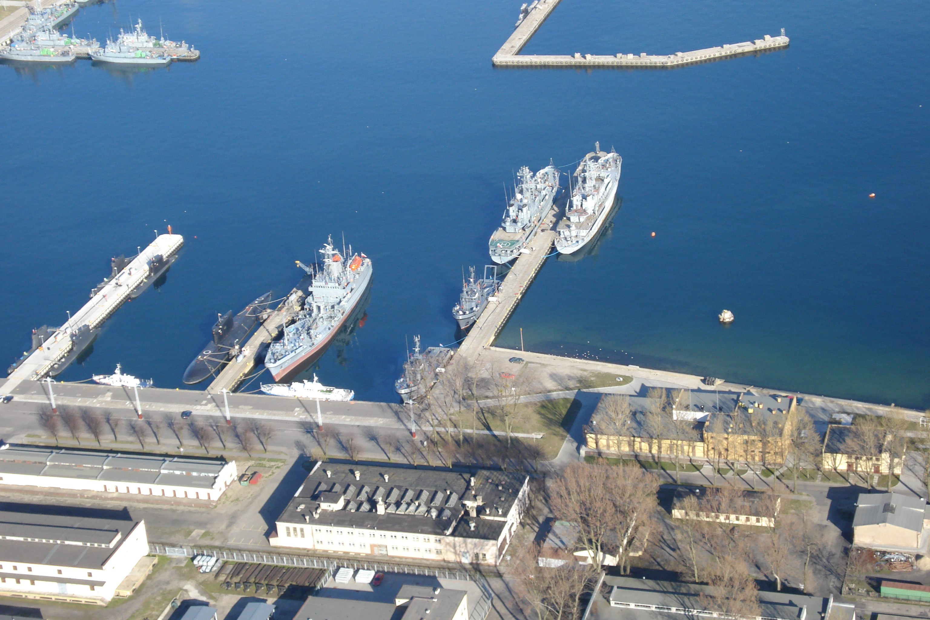 Gdynia z "lotu ptaka"